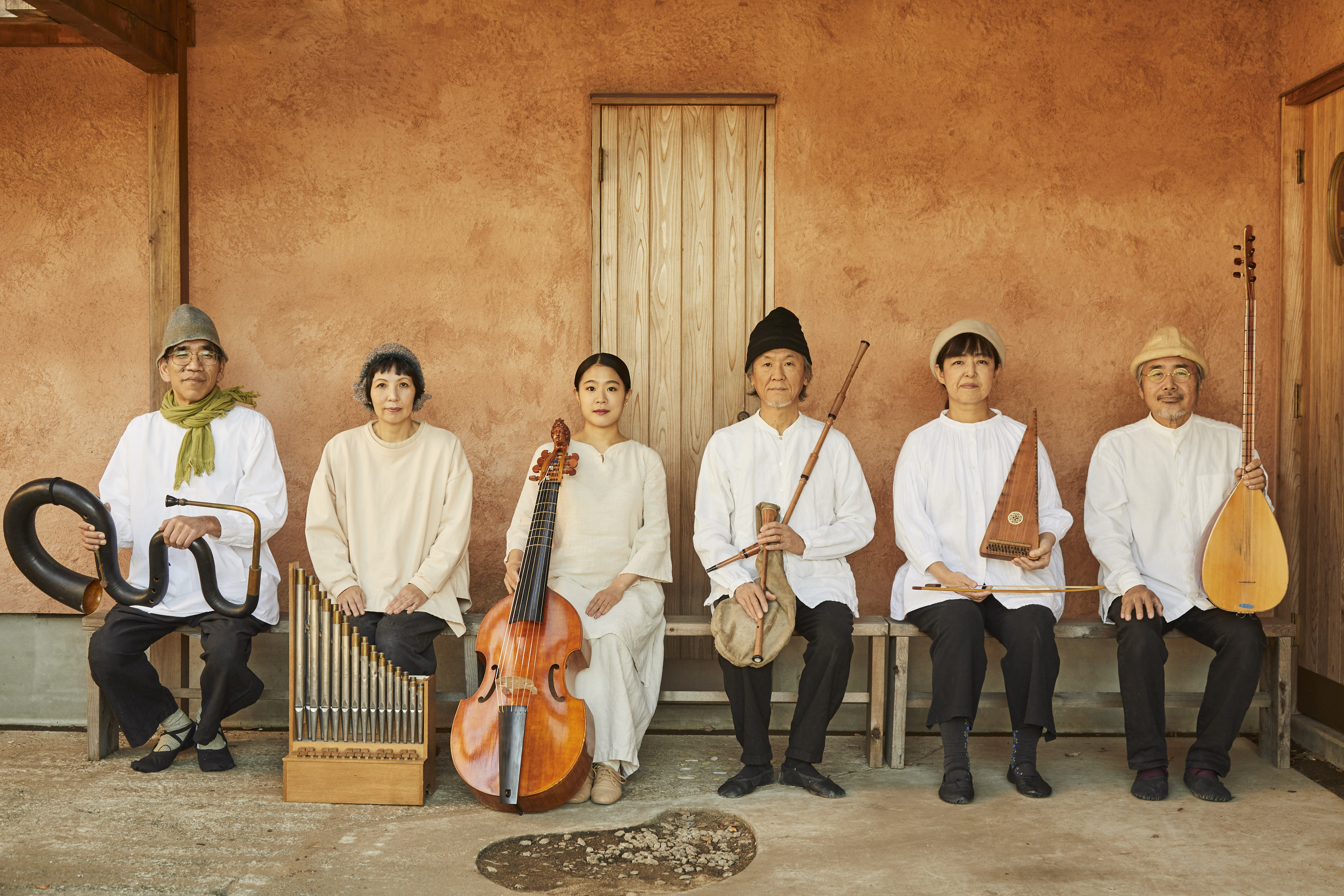 2020-02-02 プロフィール写真 立川 ロバハウス